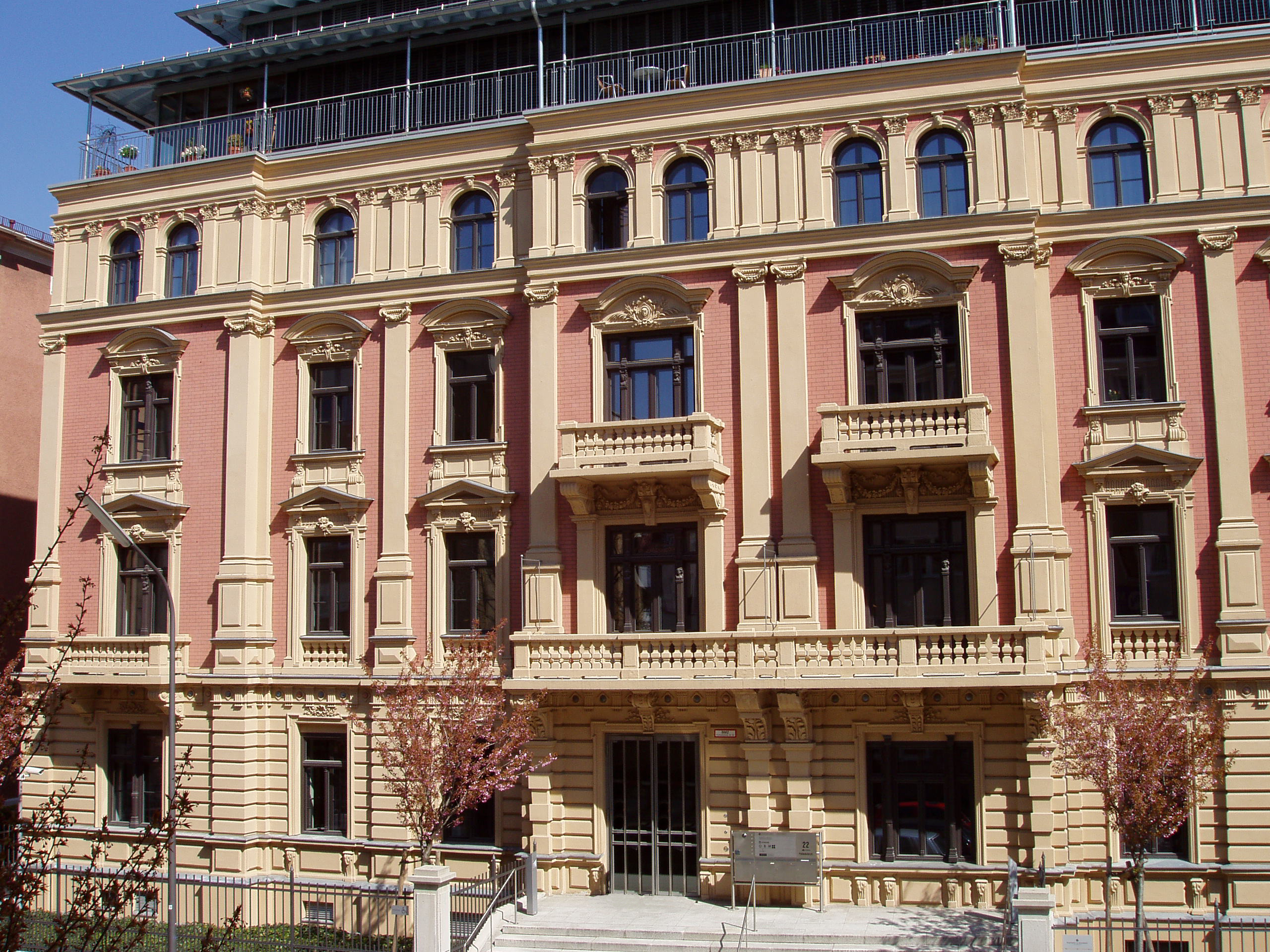 MÜNCHENER VEREIN Direktion - Palais Ingenheim Molitor Vorderseite, Pettenkoferstraße 20-22, München